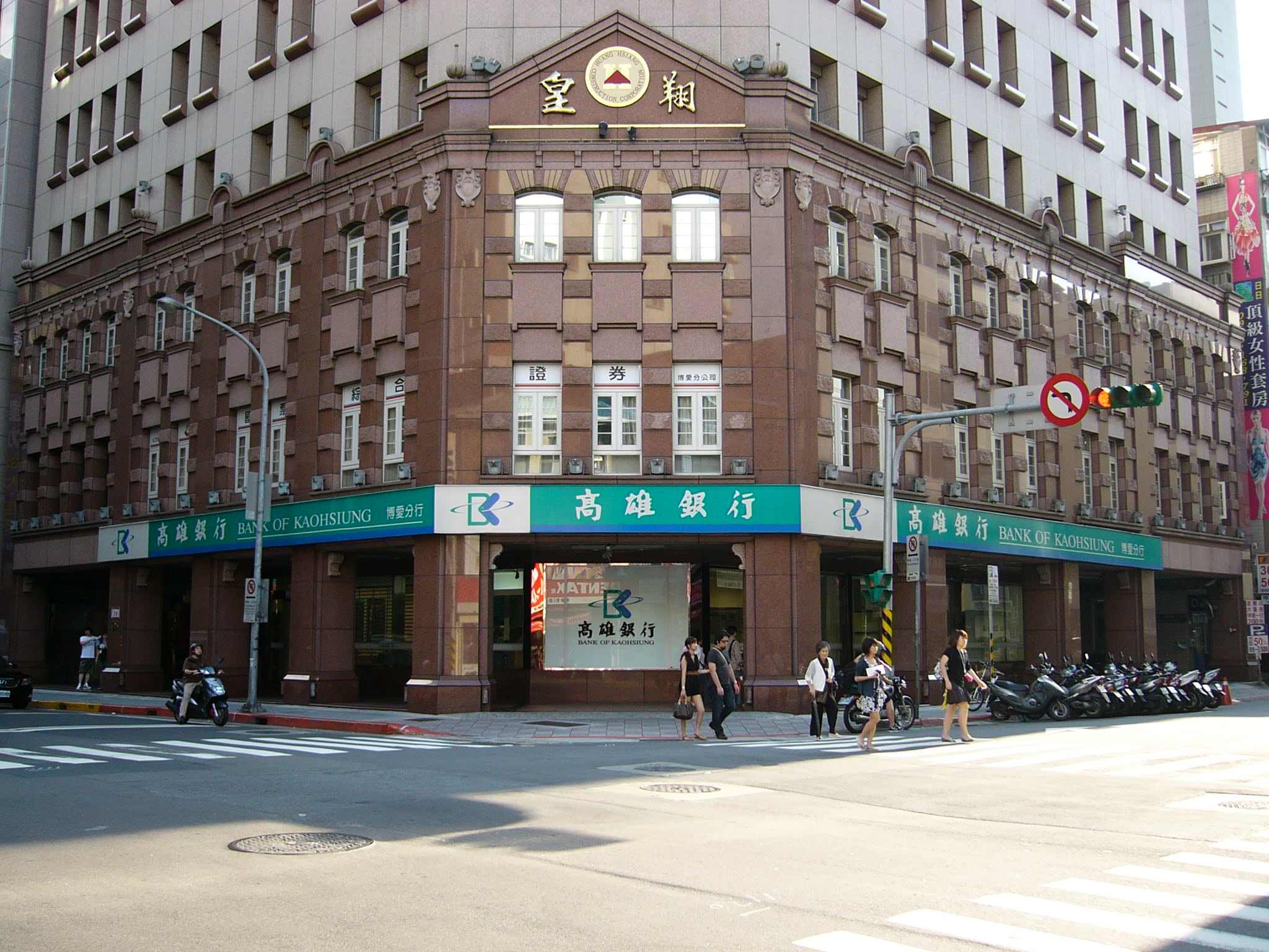 中文（台灣）: 高雄銀行博愛分行，位於臺北市中正區博愛路38號1樓及地下1樓。